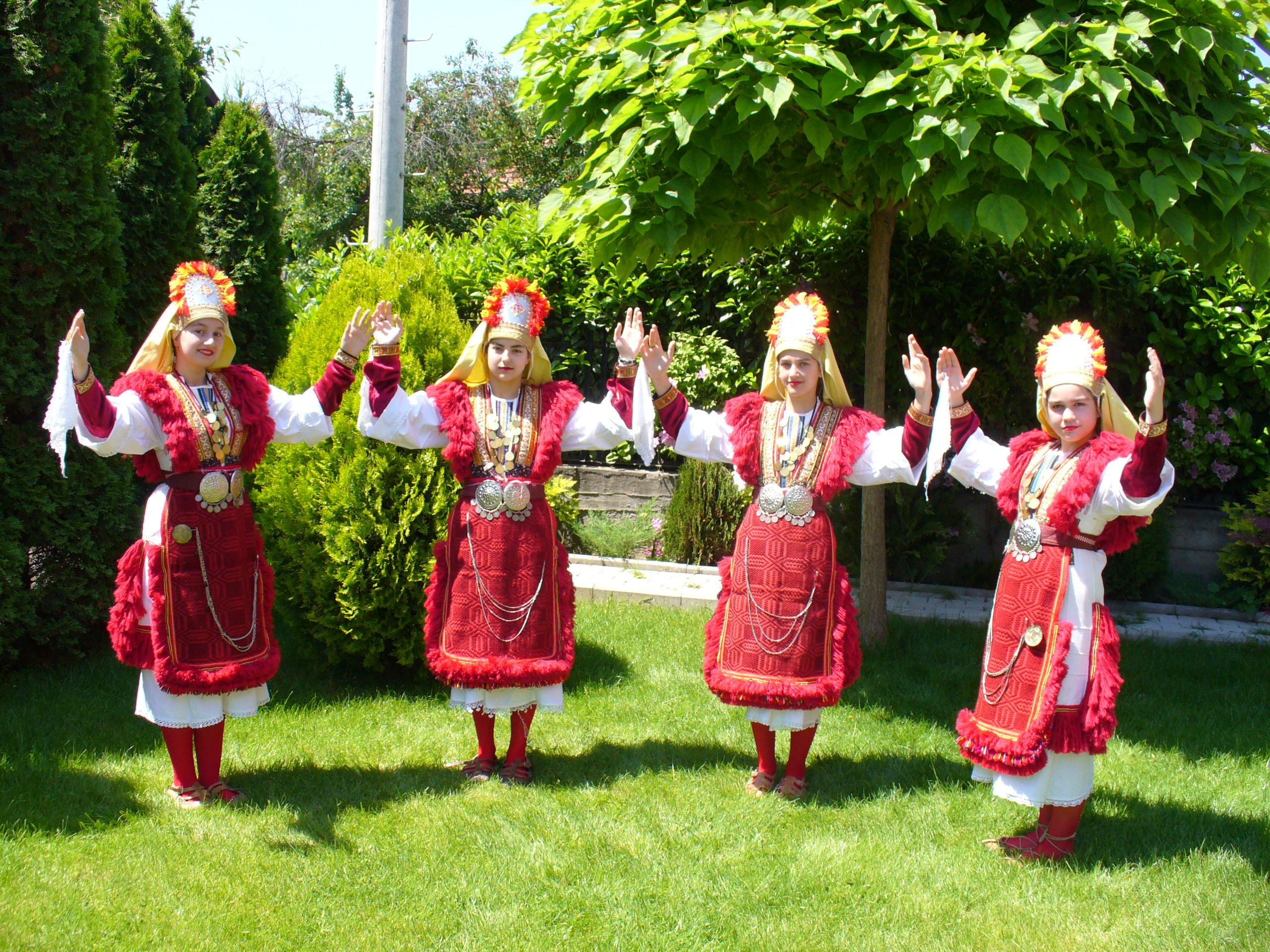 Алово,алово и уште еднаш, алово.